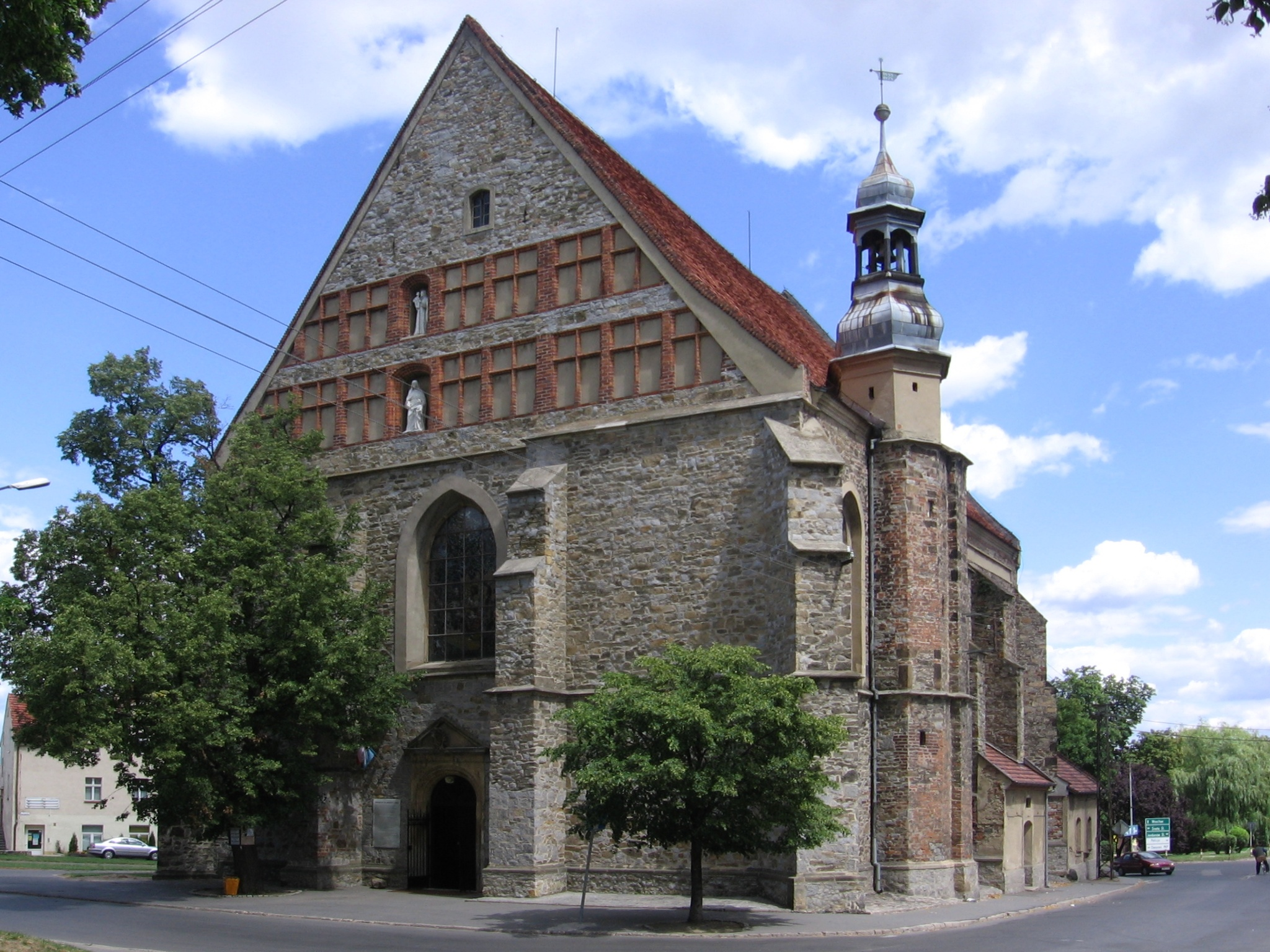 St. Anna church in Sobótka near Wrocław, Poland